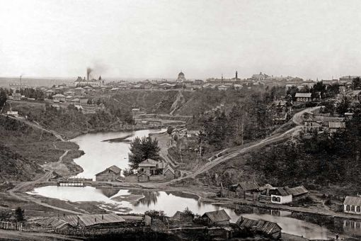 Hово-Николаевск. Река Каменка. Начало XX века